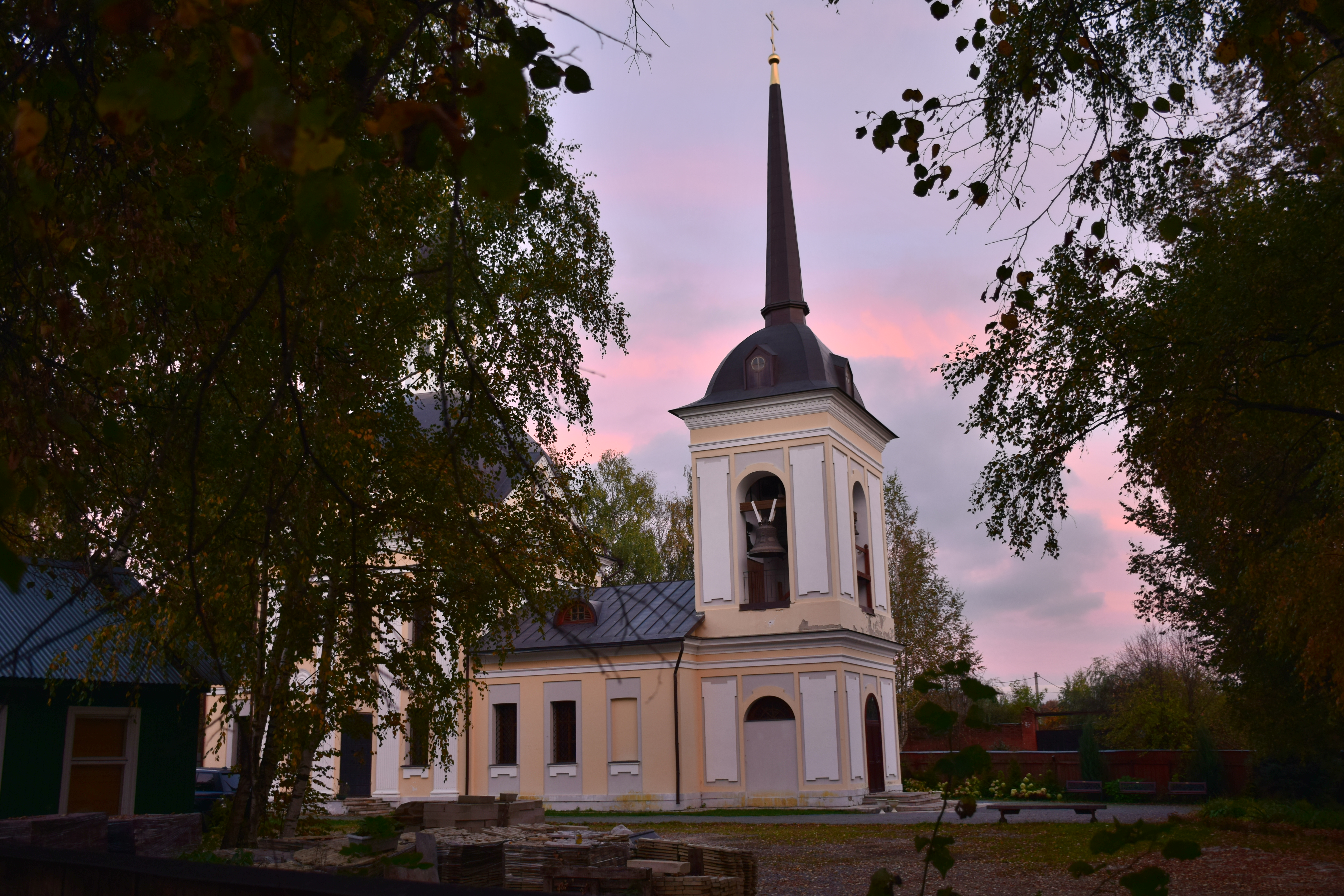 Церковь Троицы Живоначальной: Мартемьяново, Наро-Фоминский район, Московская область